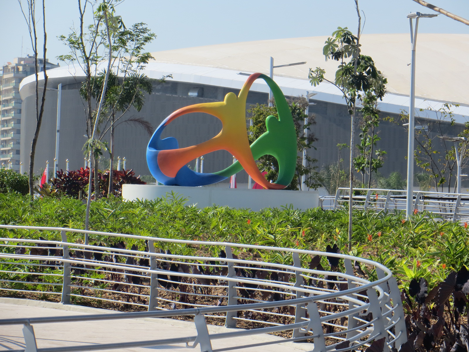 Rio de Janeiro Olympic Park